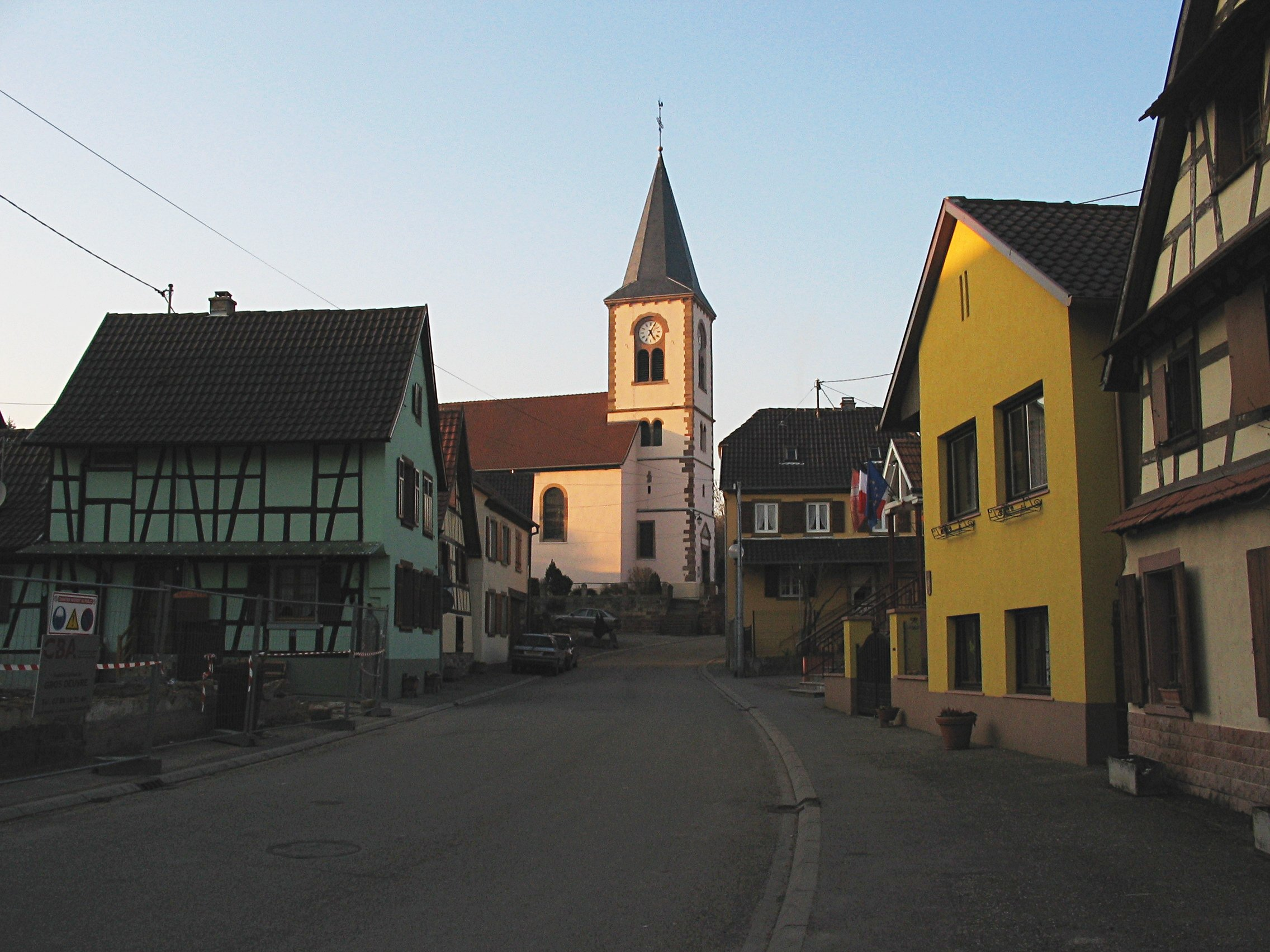 Église sainte Marguerite d'Odratzheim (Bas-Rhin)